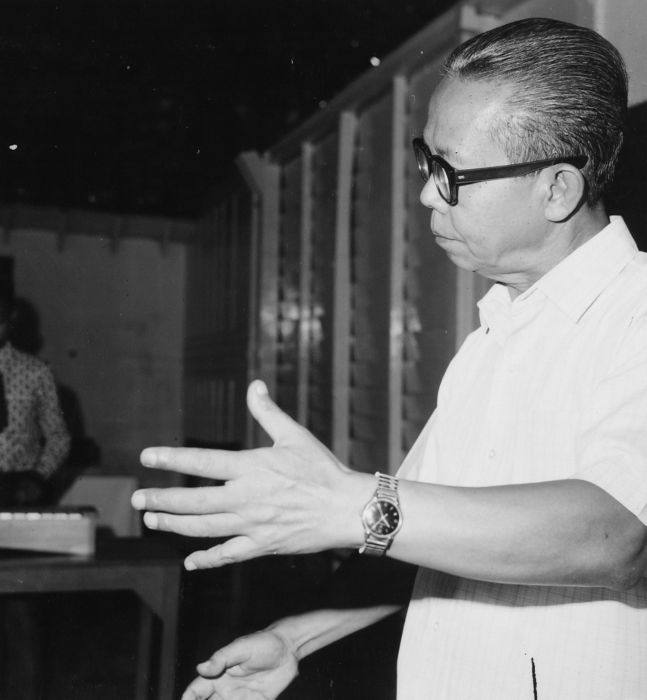 Negatief. Op het moment dat de foto werd genomen, dirigeerde Daeng Sutigna het anglungorkest van de Christelijke basisschool Paulus I te Bandung.. Portret van de muziekpedagoog Daeng Sutigna